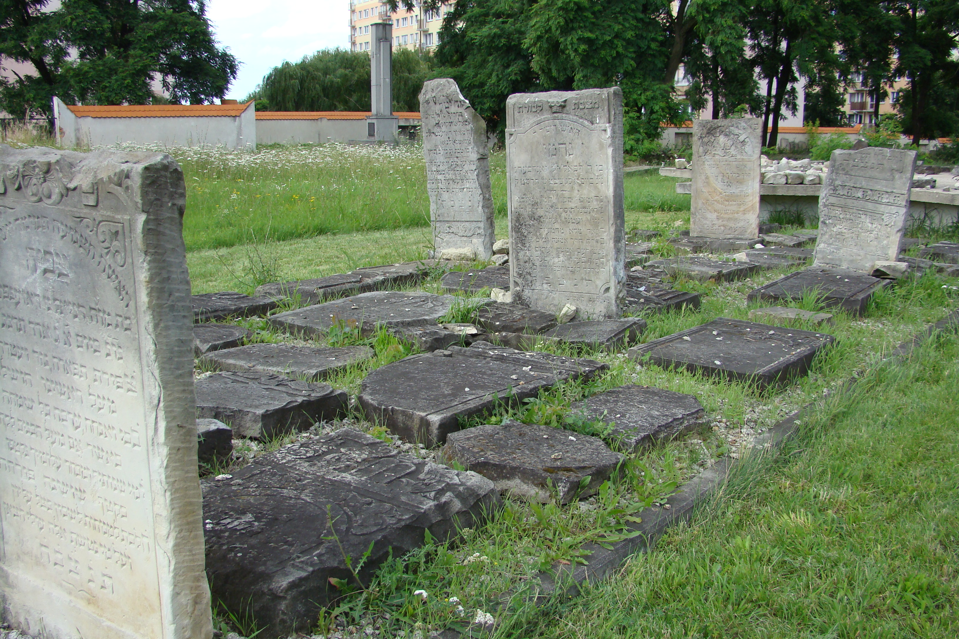 KALISZ CMENTARZ ŻYDOWSKI 1